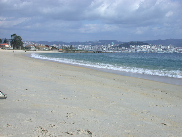 Praia de Rodeira, areal de Cangas